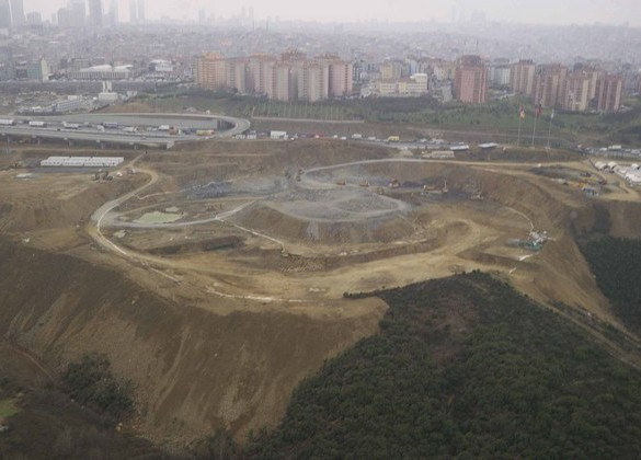 Türk Telekom Arena